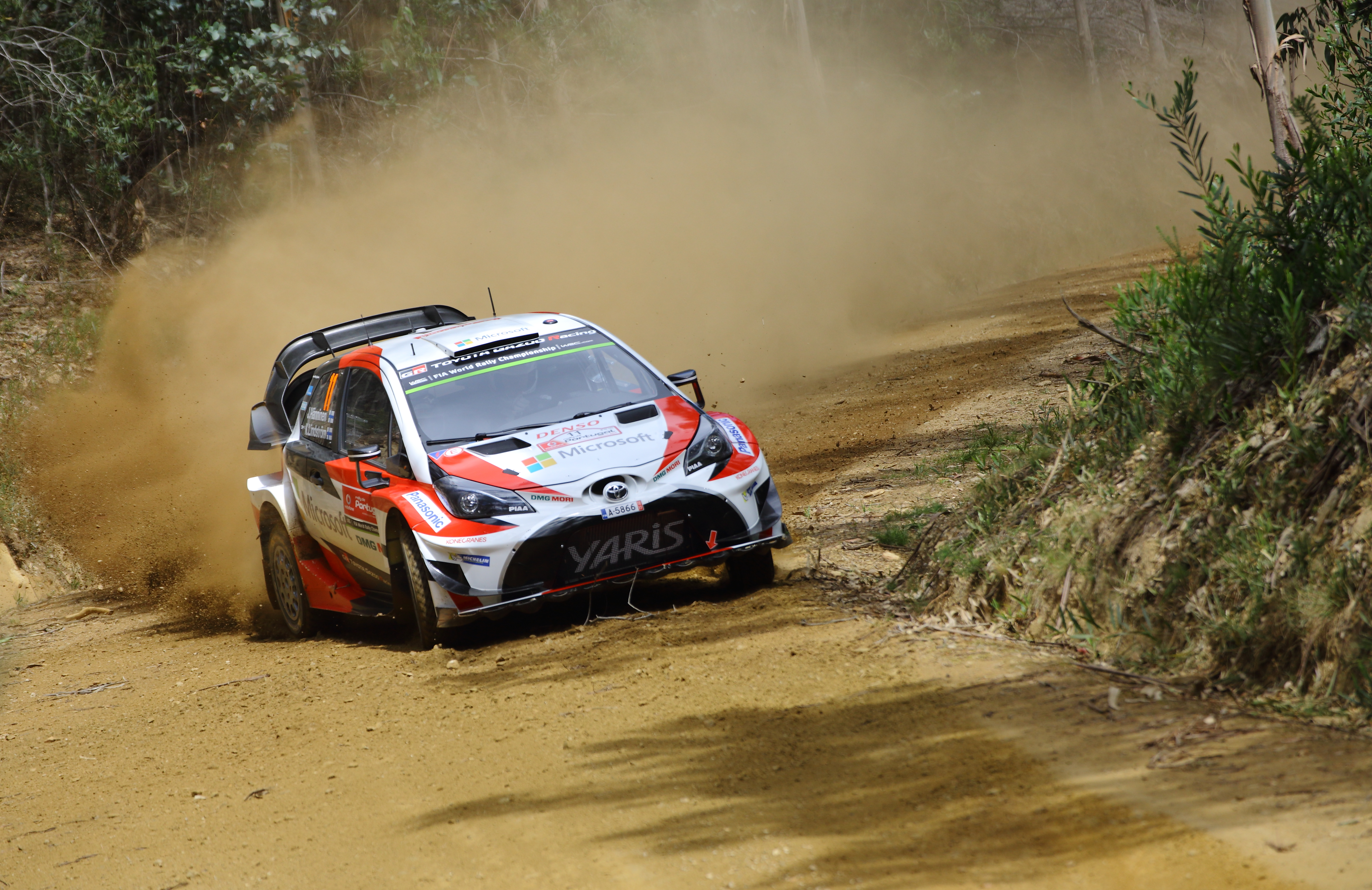 2017 Rally Portugal